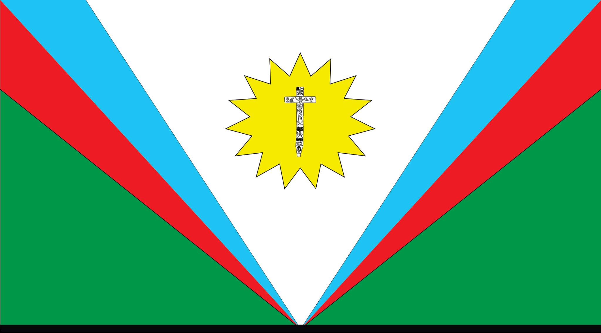 Autor: Pedro Faustino Rimini